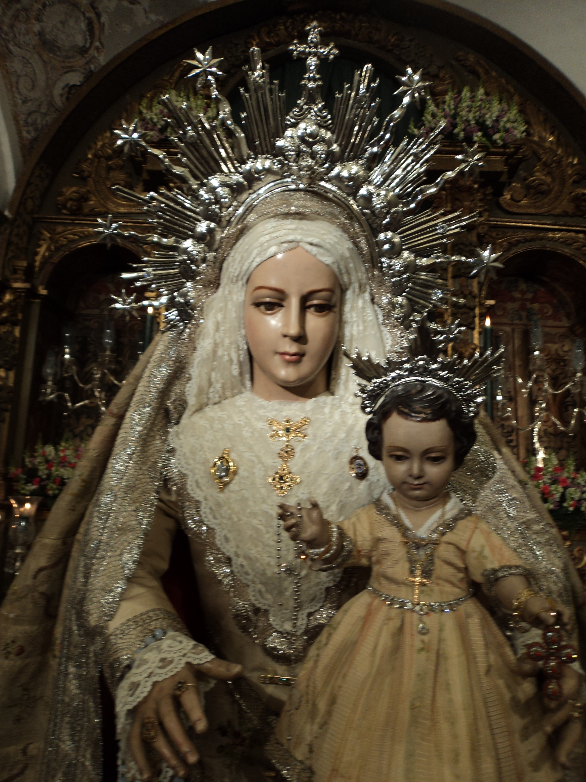 Besamanos de la Virgen de los Remedios 2012.